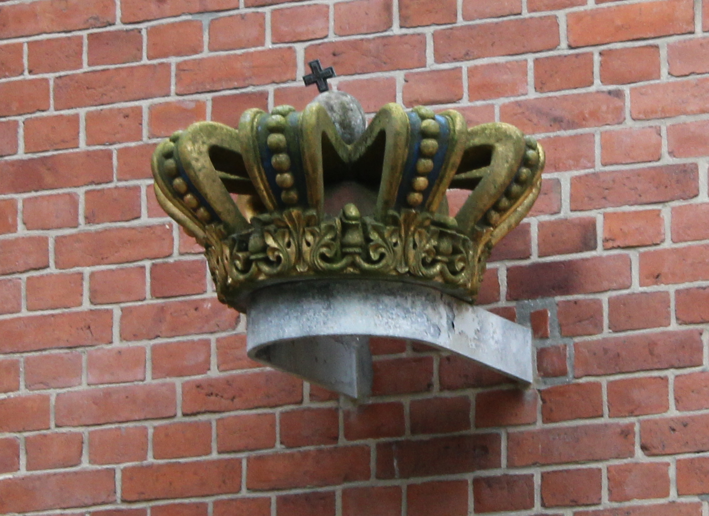 Krone am Heinrich-Sauermann-Haus